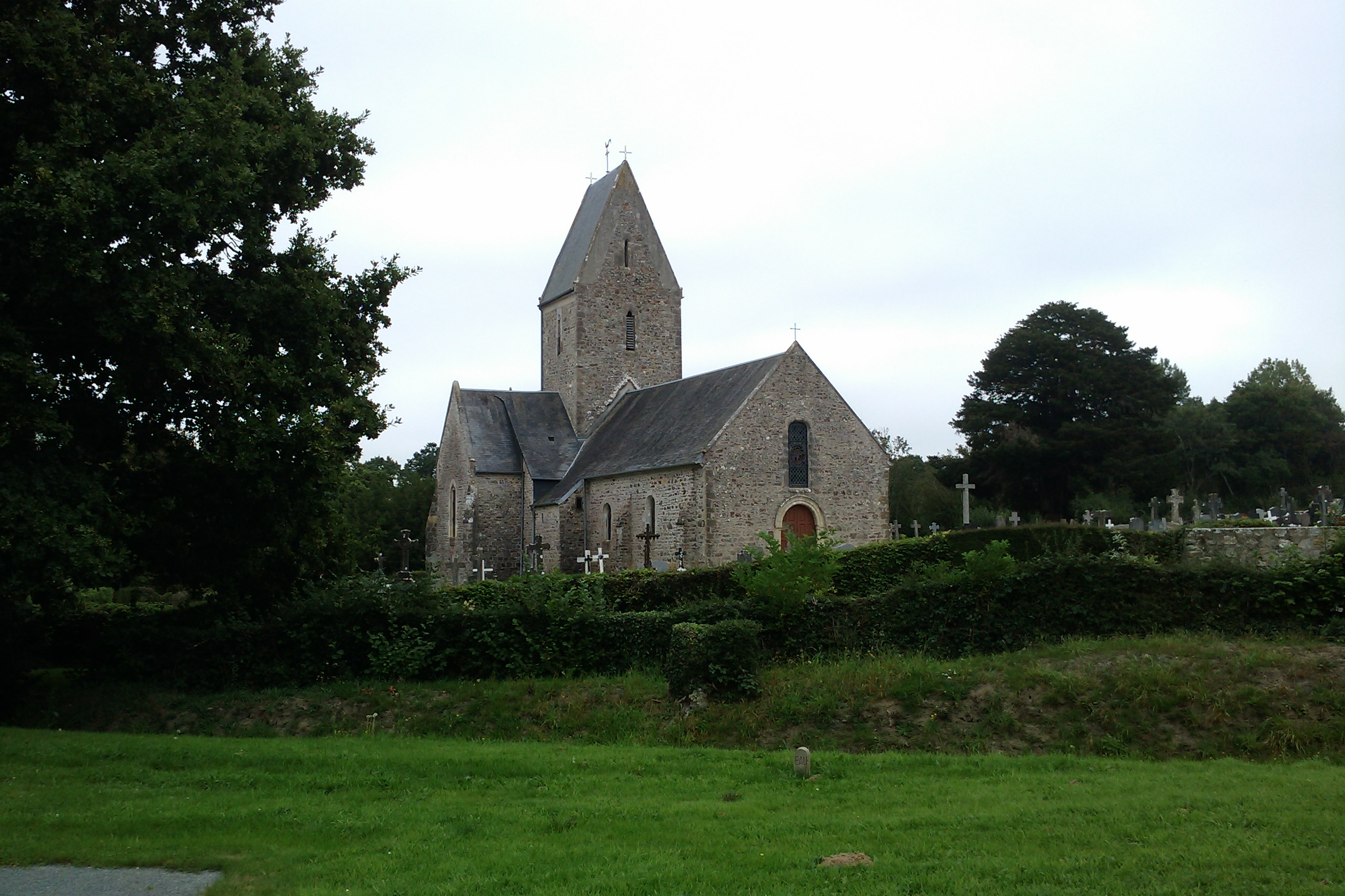 Église de Mobecq